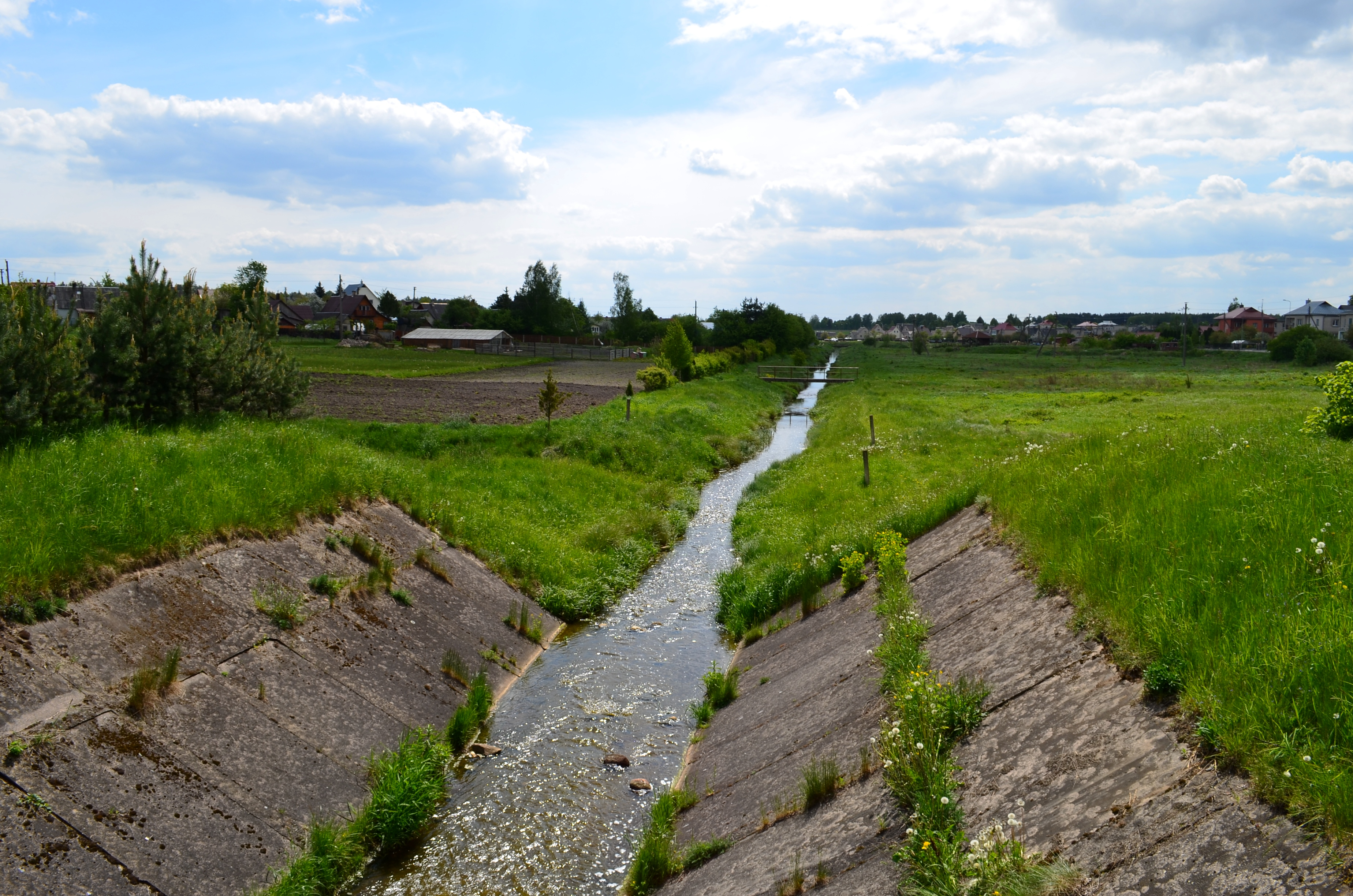 Šalčia Šalčininkuose